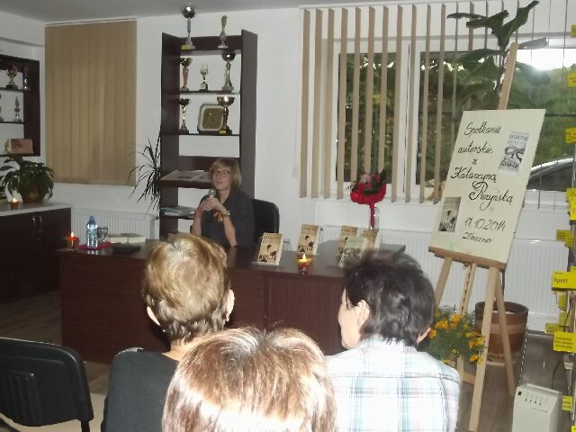 Katarzyna Puzyńska na spotkaniu autorskim w Zbicznie 17.10.2014r.